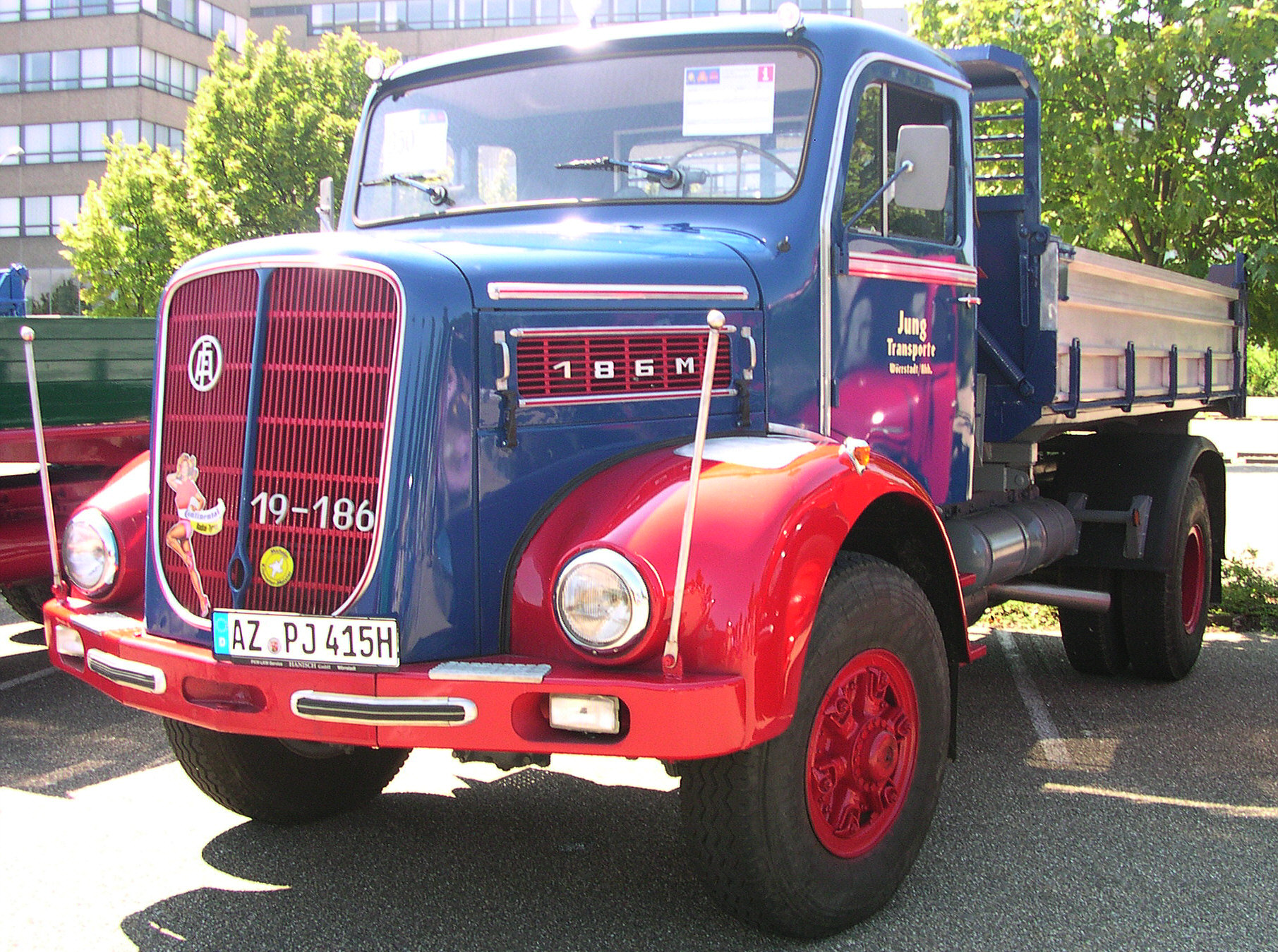 ÖAF 19.186M Kipper in Wörth am Rhein beim Oldtimer-Treffen bei Daimler-Chrysler